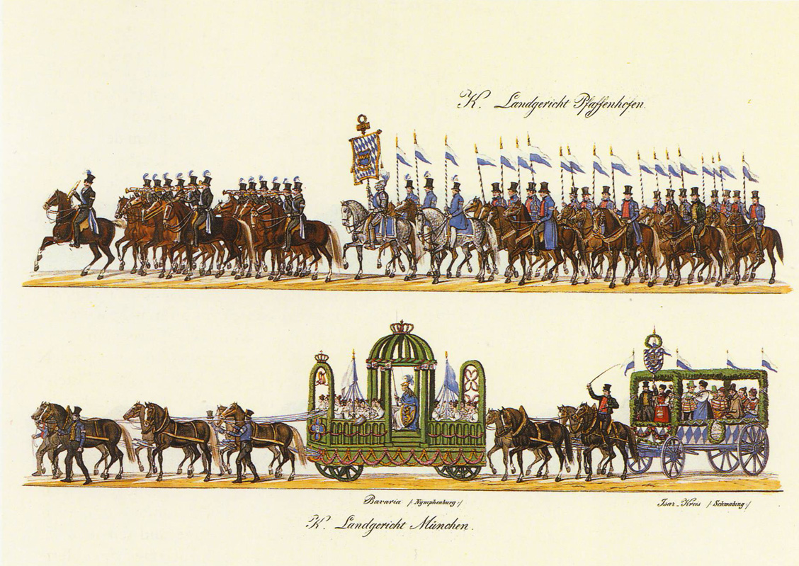 Darstellung des Jubiläumsfestzugs zum 25-jährigen Bestehen des Oktoberfests